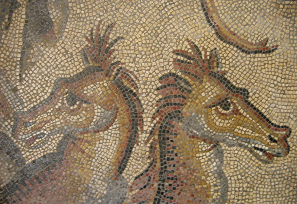 Autun, musée Rolin : mosaïque du triomphe de Neptune